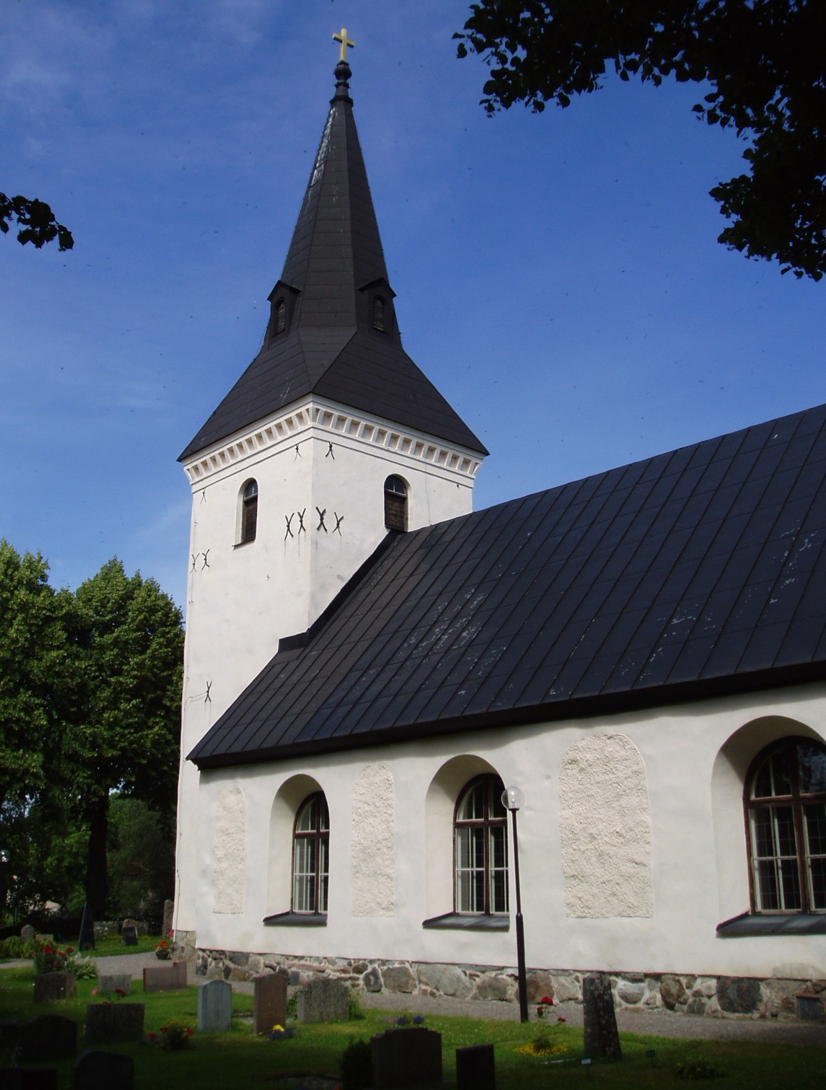 Överenhörna kyrka, Södermanland, Sverige